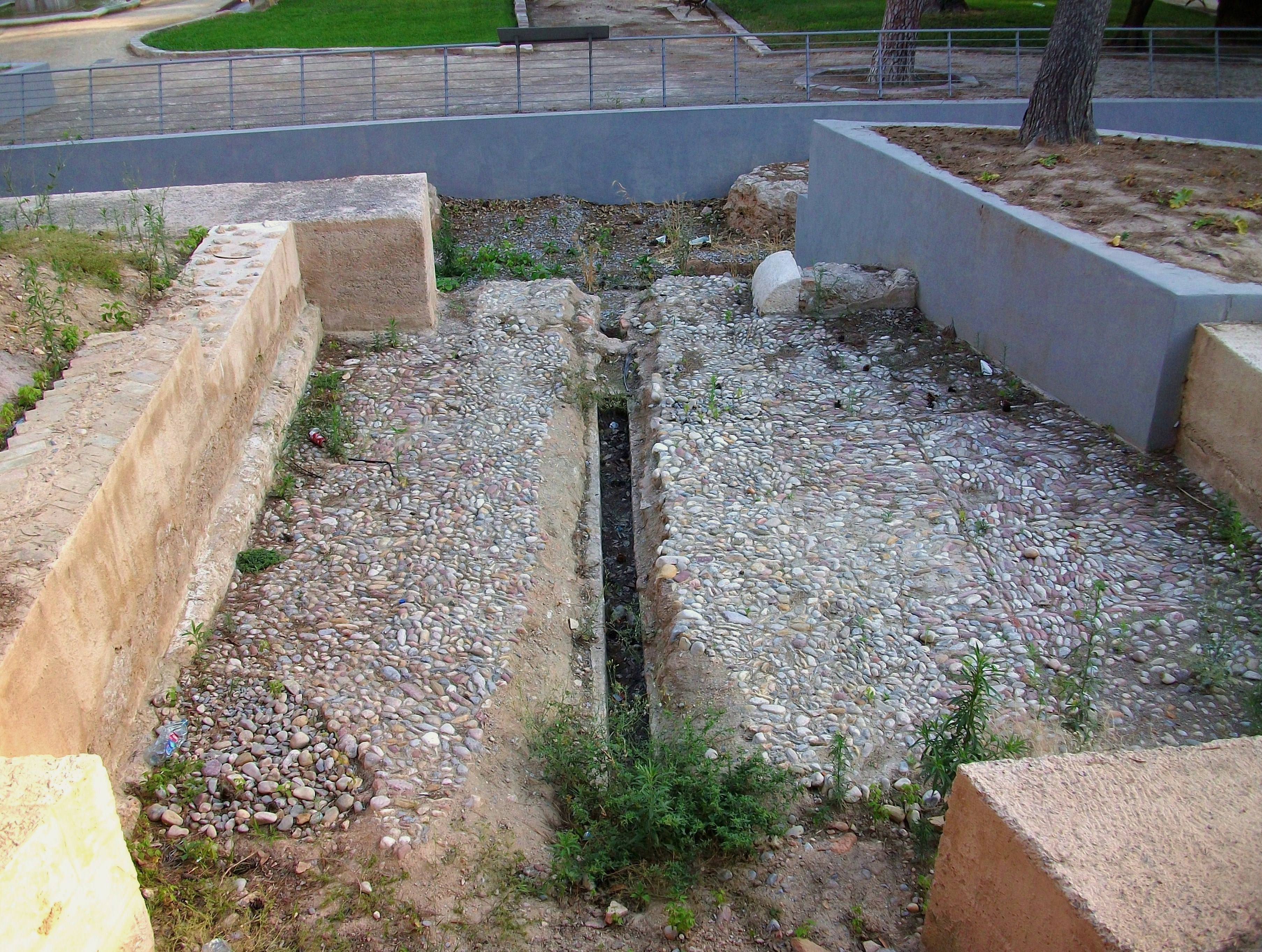 Porta sud-occidental del palau del Real de València. En època medieval aquesta part del palau posseïa un únic accés fortificat. En el segle XVII, perduda feia segles la seua funció militar, es va obrir una nova porta en l'ala occidental per permetre l'accés directe al pati secundari i a les estances construïdes al seu voltant. Les excavacions han documentat la porta que es va obrir a través dels murs d'una antiga habitació. El referit portal permetia el pas dels carruatges gràcies a la seua amplitud i a que estava pavimentat amb còdols. En asquesta pati hi havia una escala per la qual tambés es podia accedir a l'església i a les estances superiors, on residien els virreis en aquest període, mentre que a sota estaven ubicades les cuines i els rebosts.